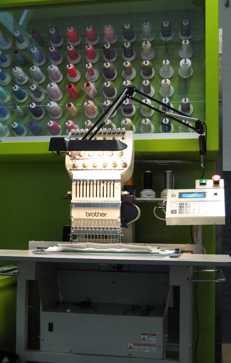 Borduurmachine, Brother, 2001 (09890) borduurmachine brother(2001)